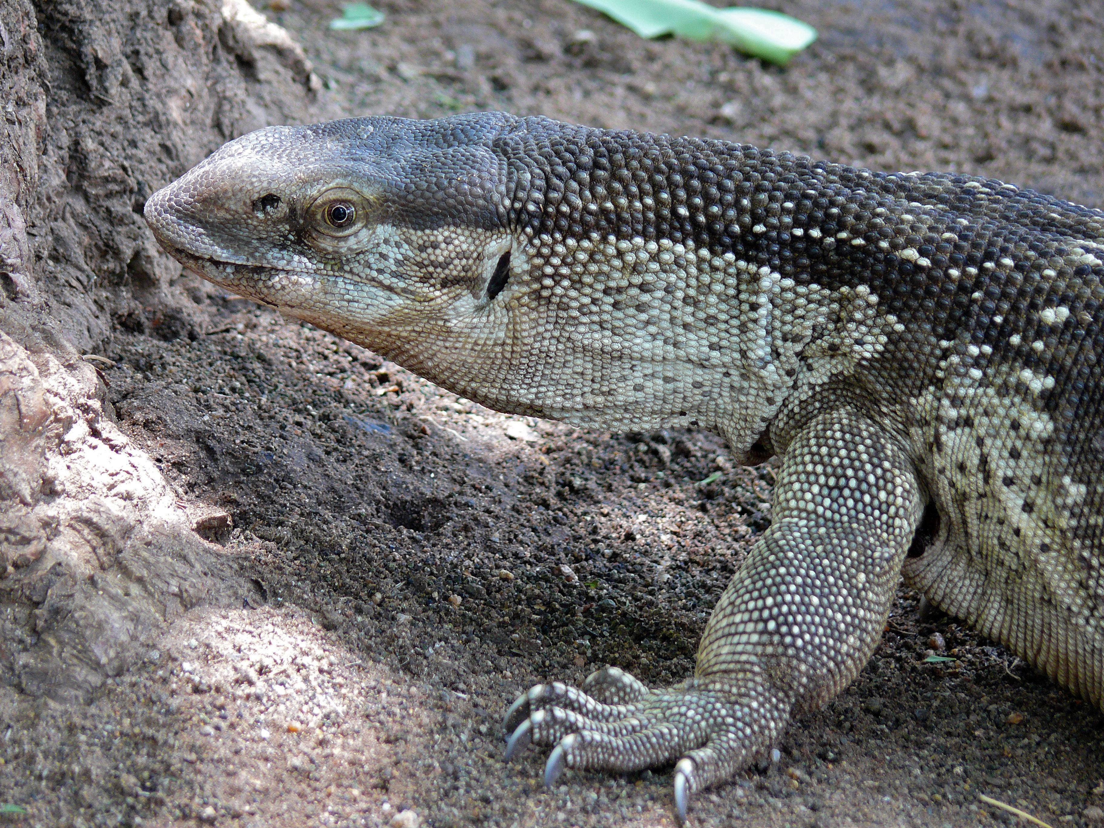 Letaba Camp, Kruger NP, SOUTH AFRICA